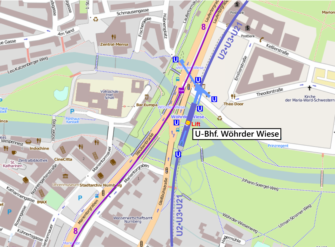 Lageplan U-Bahnhof Wöhreder Wiese